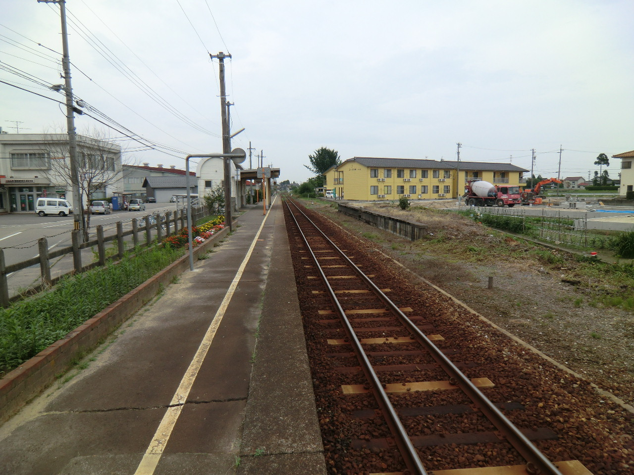 油田駅 ホーム南端より